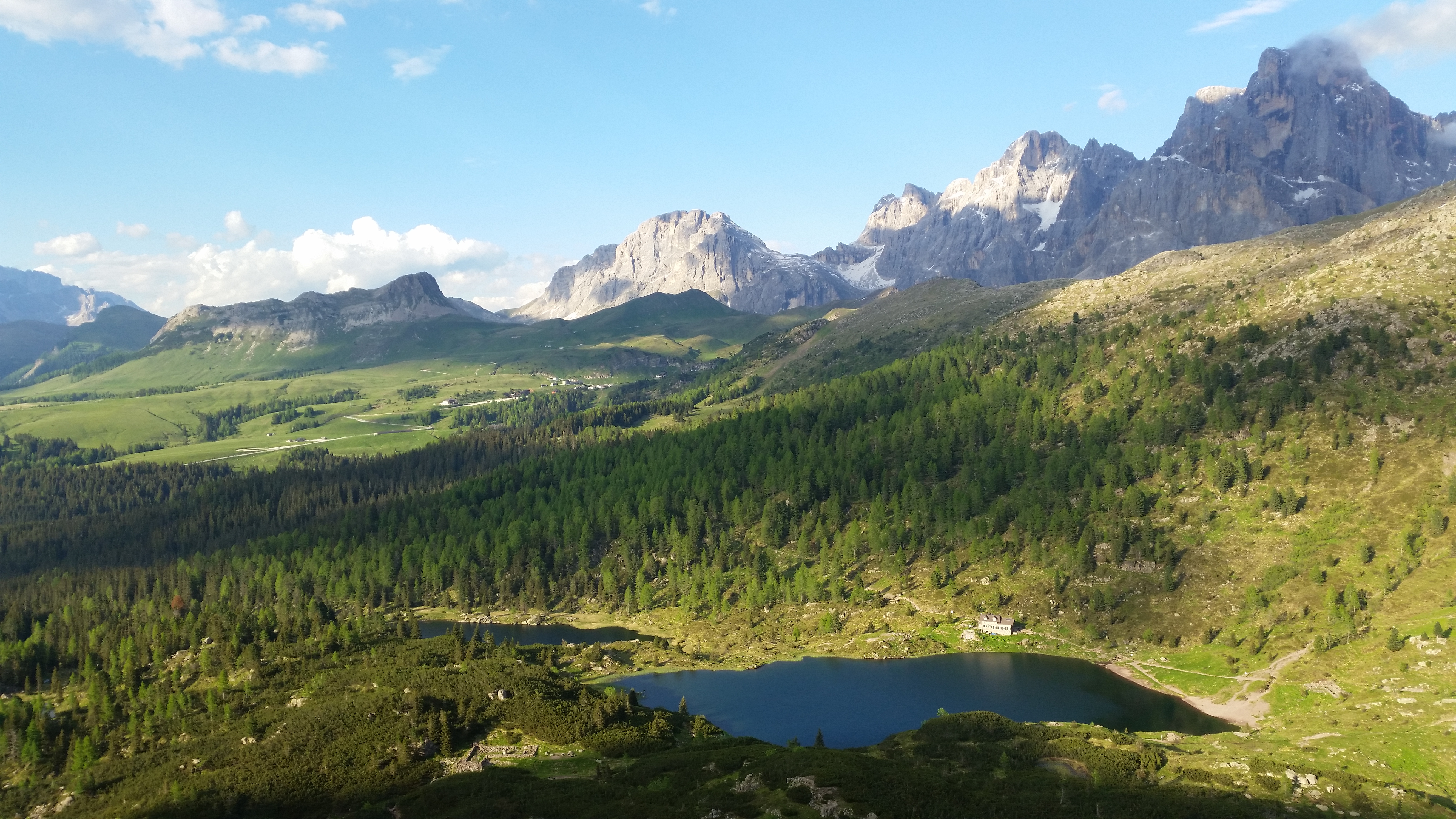 Vista del rifugio dalle pendici del Cobricon